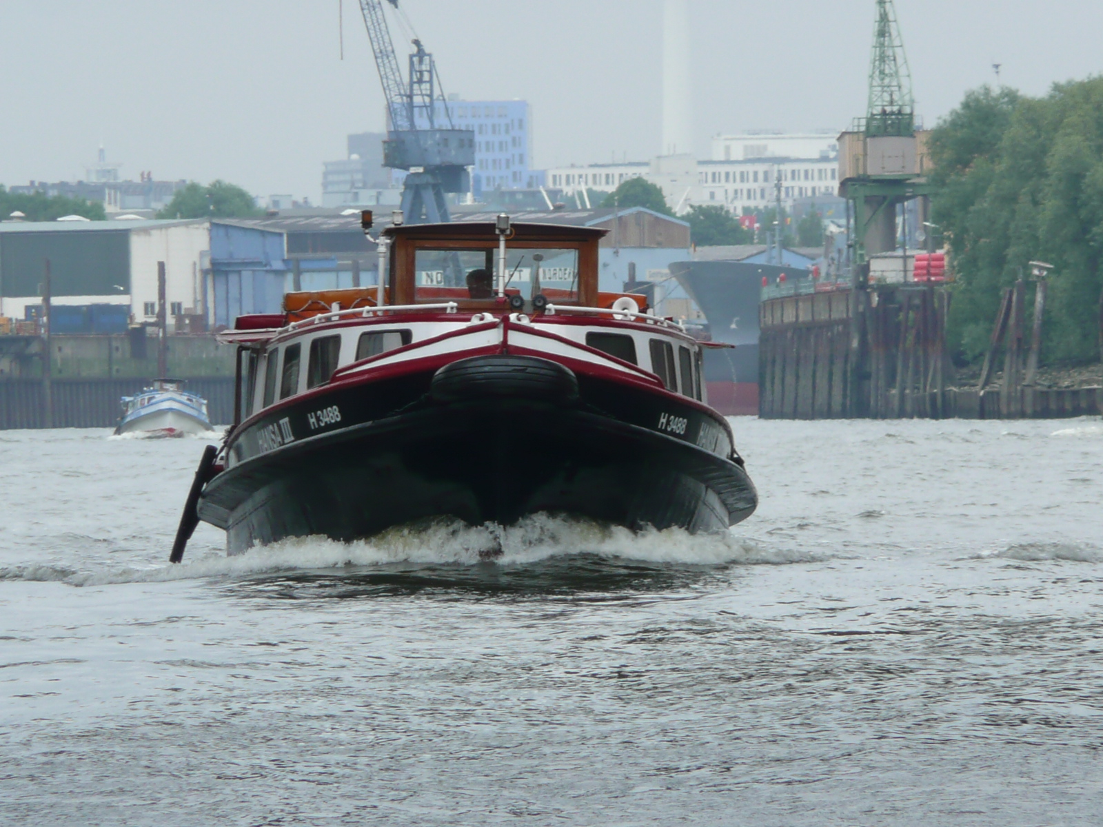 Barkasse „Hansa III“ (Baujahr 1942) auf der Elbe in Hamburg.